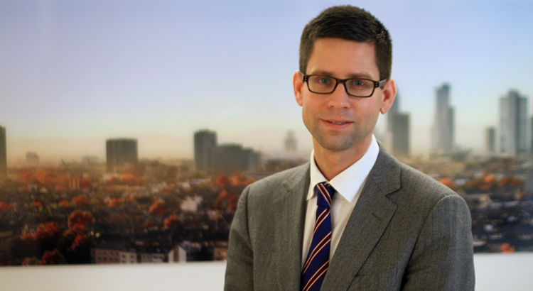 Bild